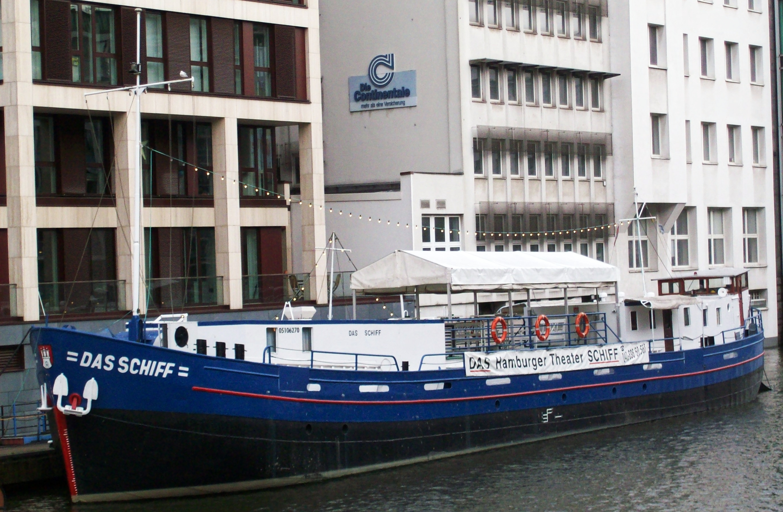 Das Schiff=